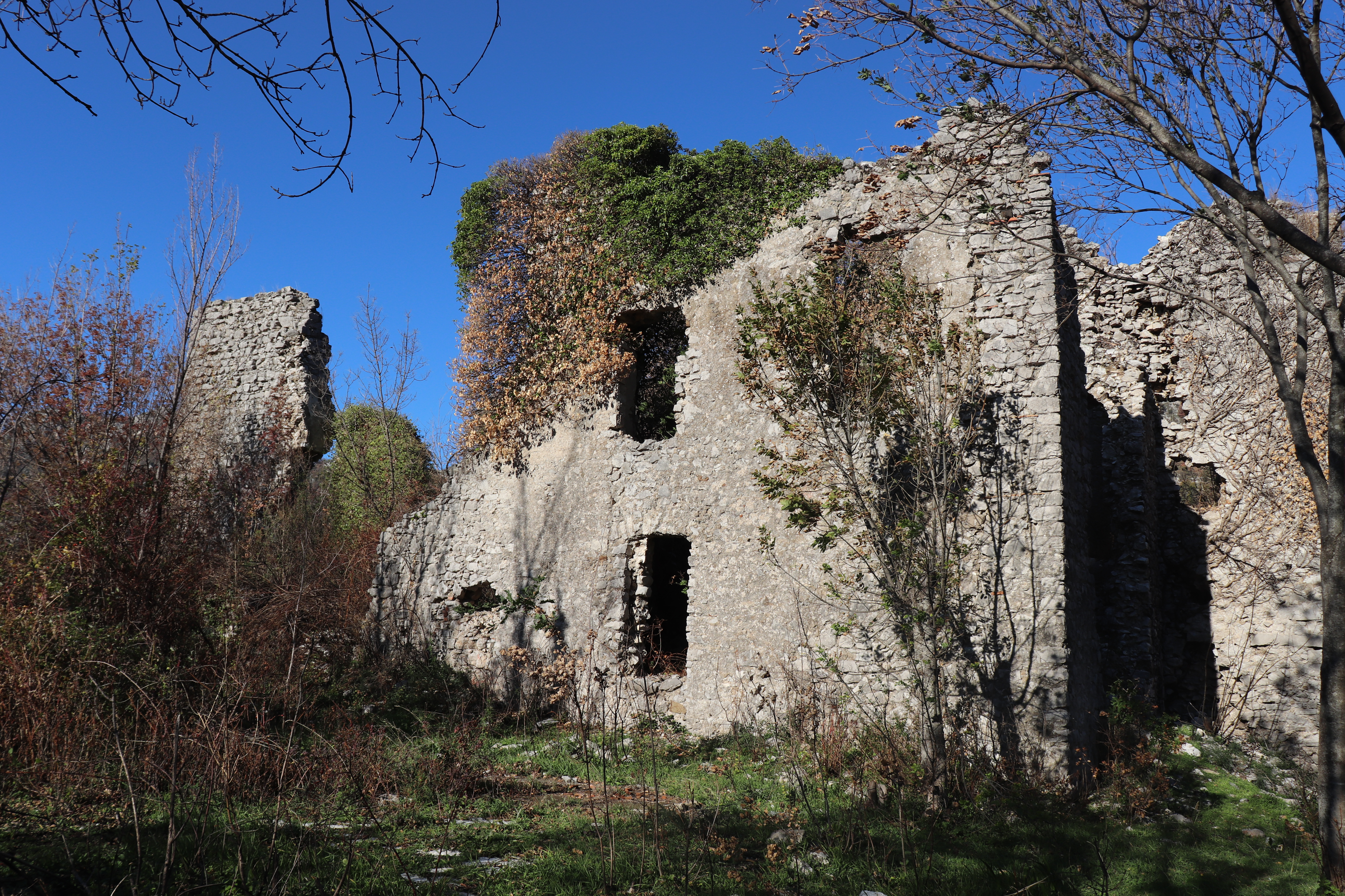 Ambienti residenziali del castello di Solofra che si affacciavano alla corte interna